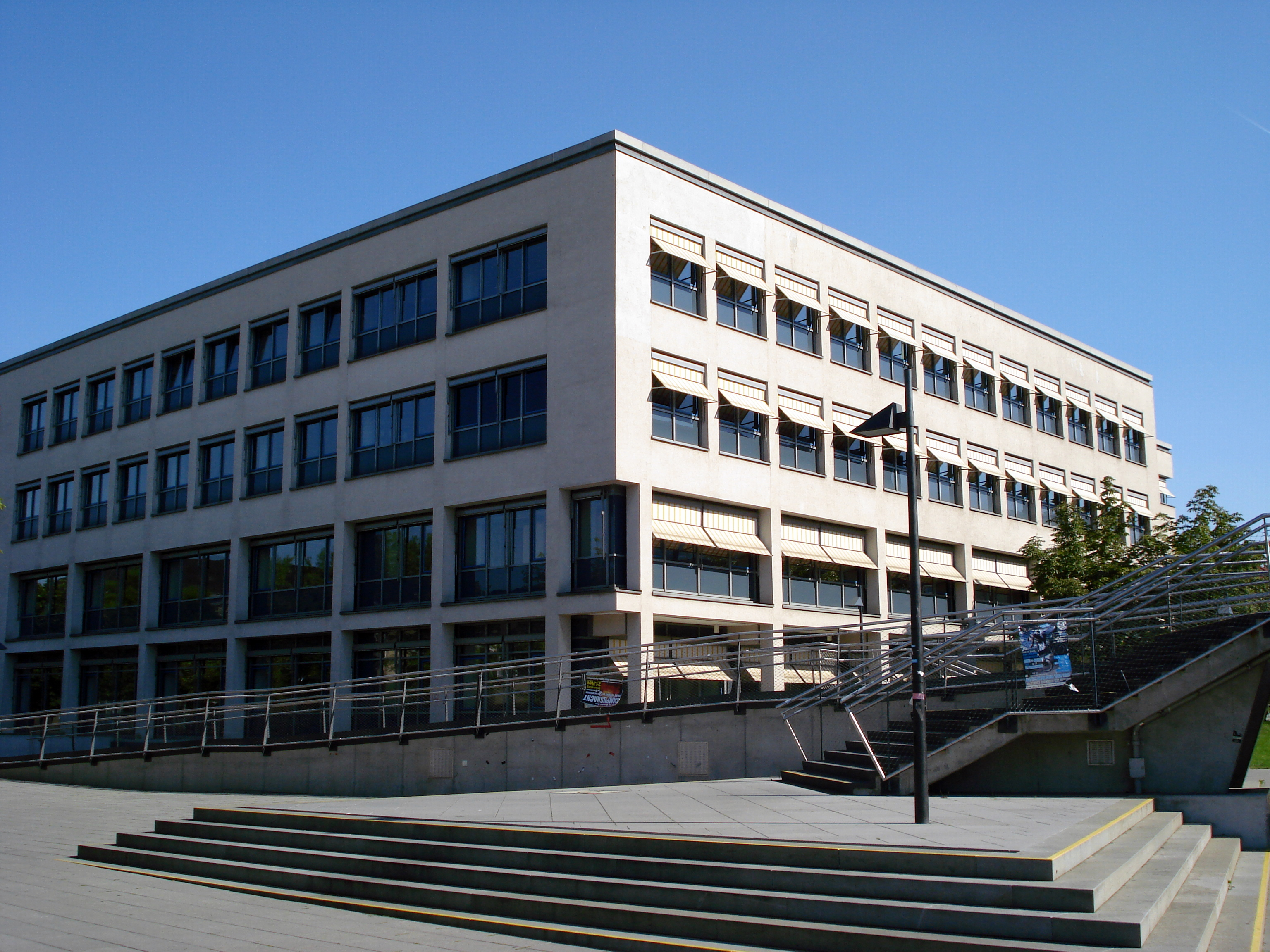 TU Dresden, von-Gerber-Bau, Bergstraße